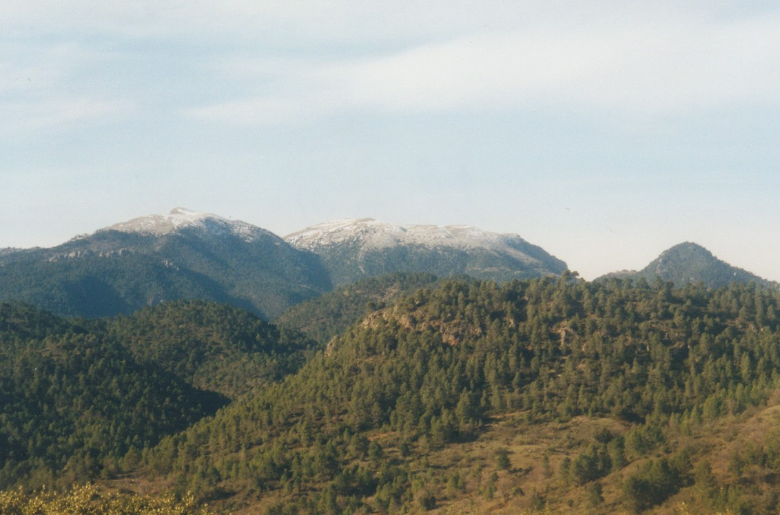 Pico de la Sarga en Albacete